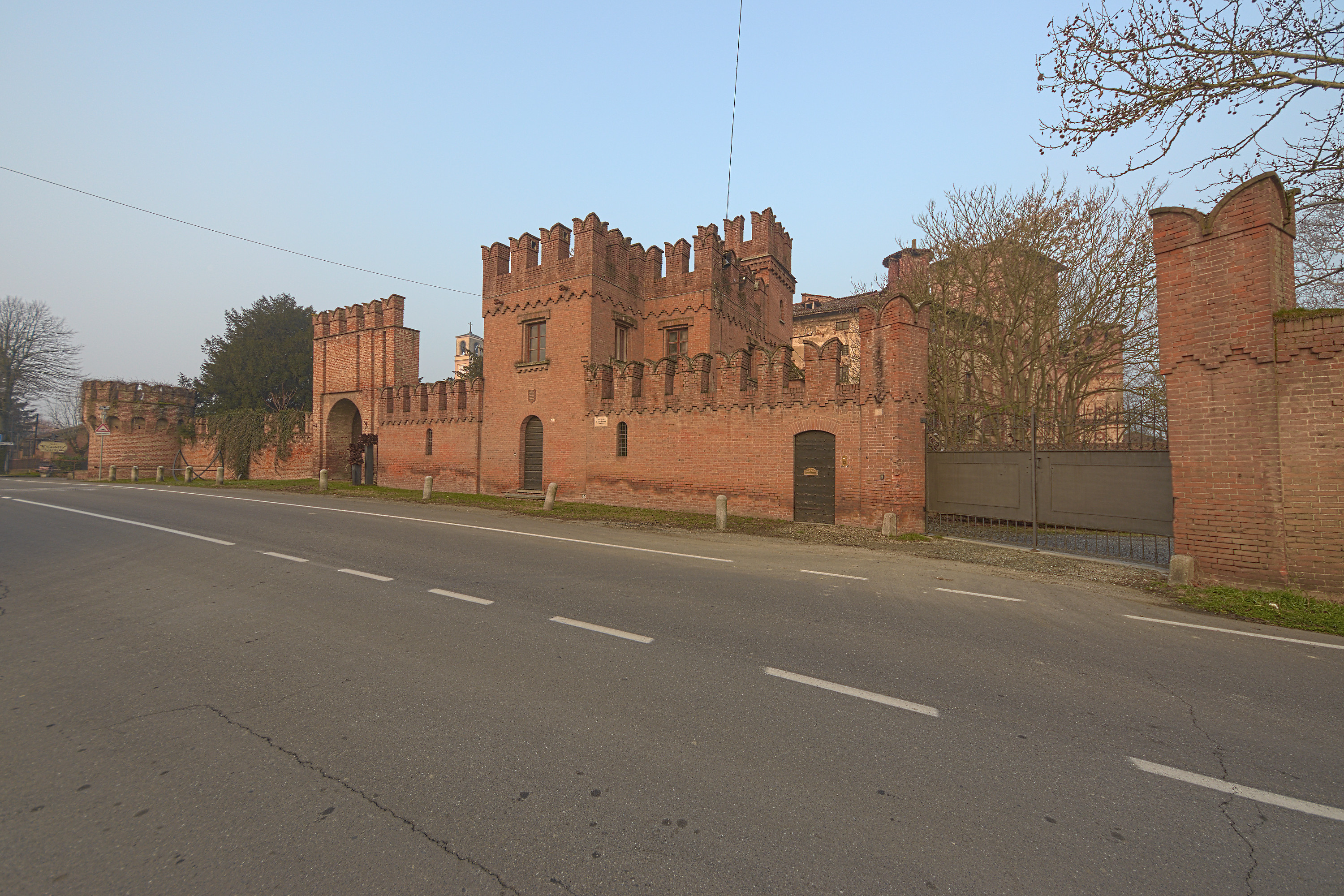 Castello di Piovera, lato sulla provinciale